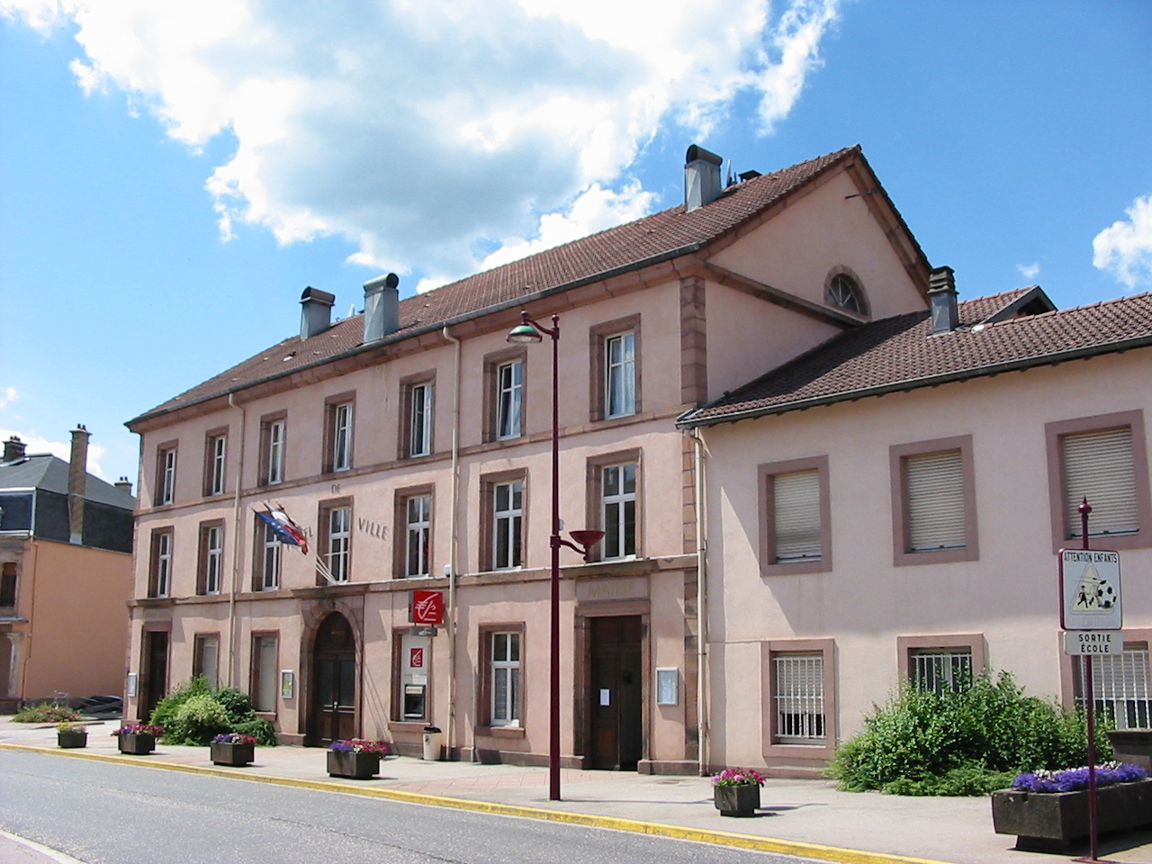 Provenchères-sur-Fave (88-Vosges). La mairie.